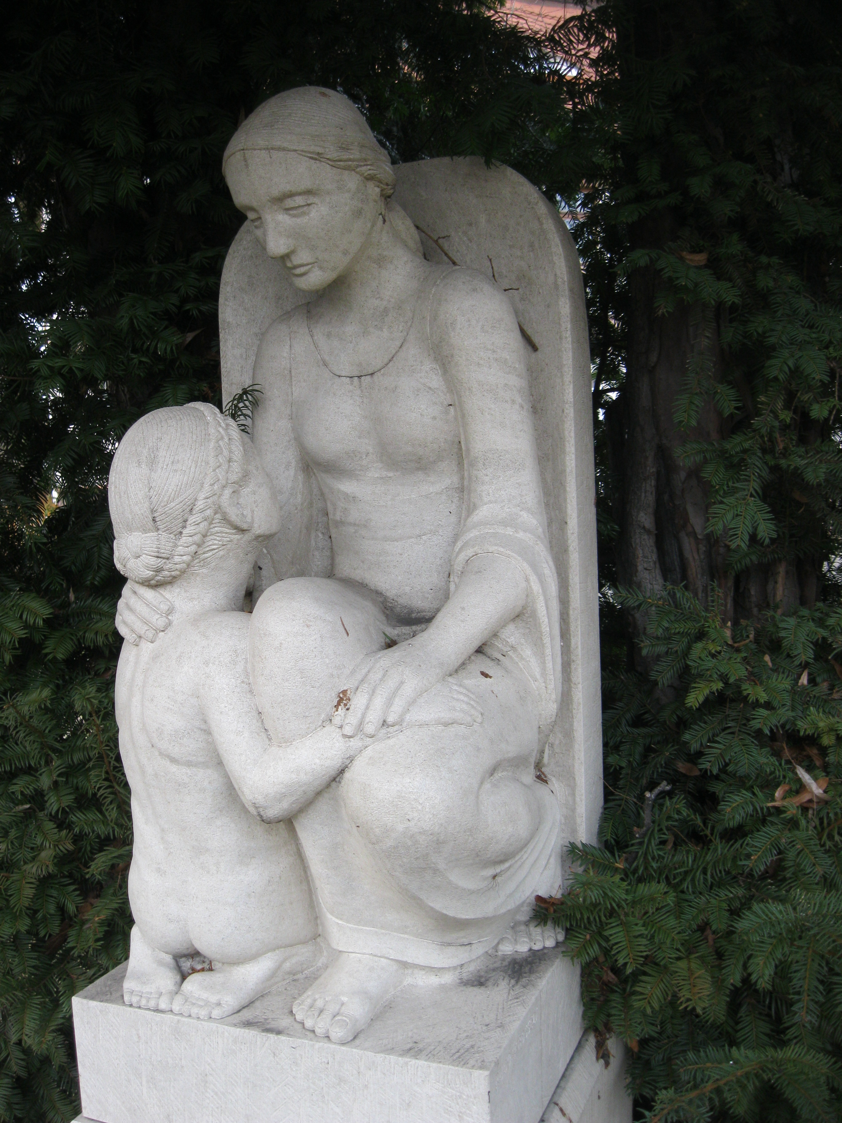 um 1922 Magdeburg Mutter und Kind von Rudolf Bosselt Kalkstein Louis-Braille-Straße 13 in 39118